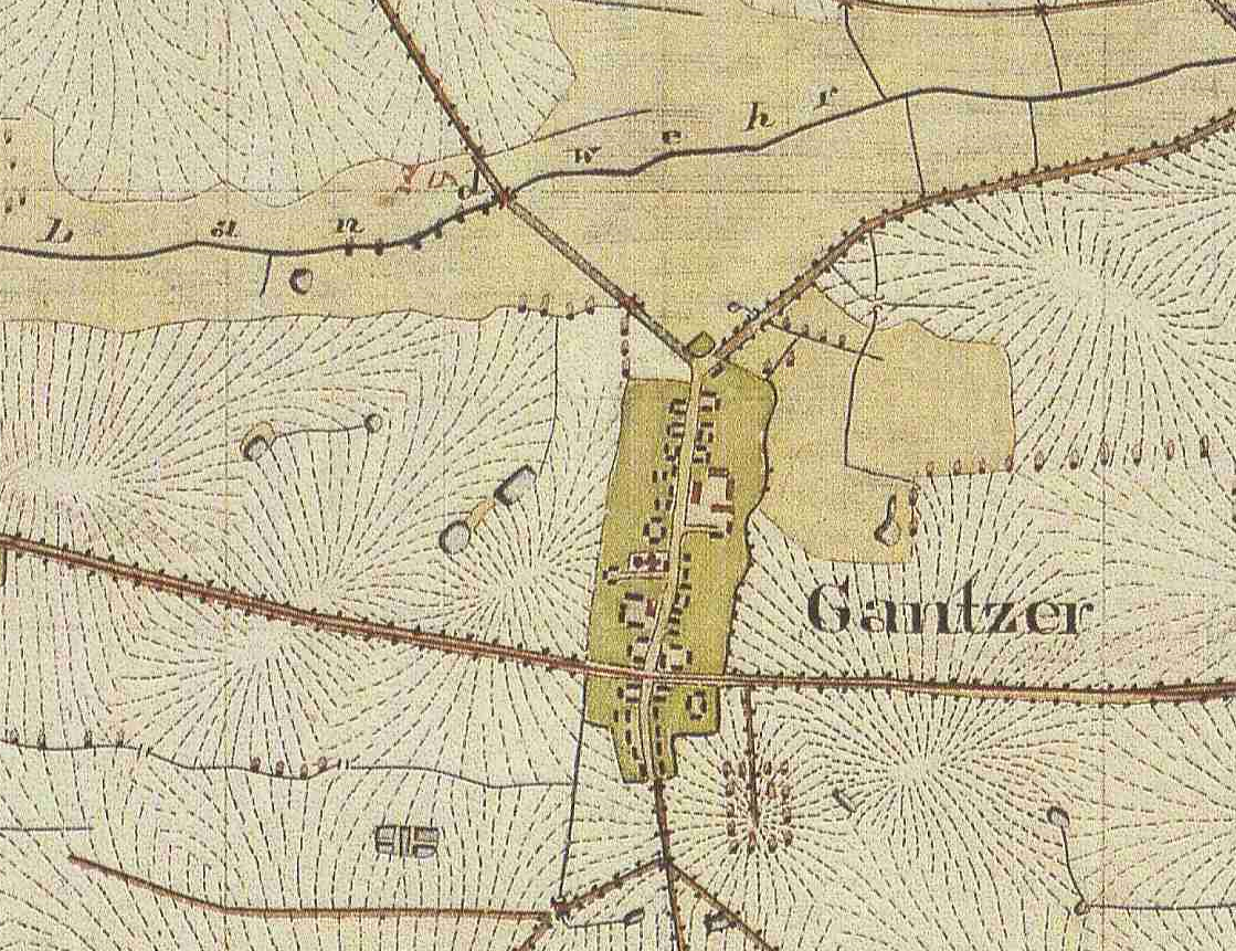 Ganzer, Ortsteil der Stadt Wusterhausen/Dosse, Landkreis Ostprignitz-Ruppin, Brandenburg, Ausschnitt aus dem Urmesstischblatt 3141 Wildberg von 1825